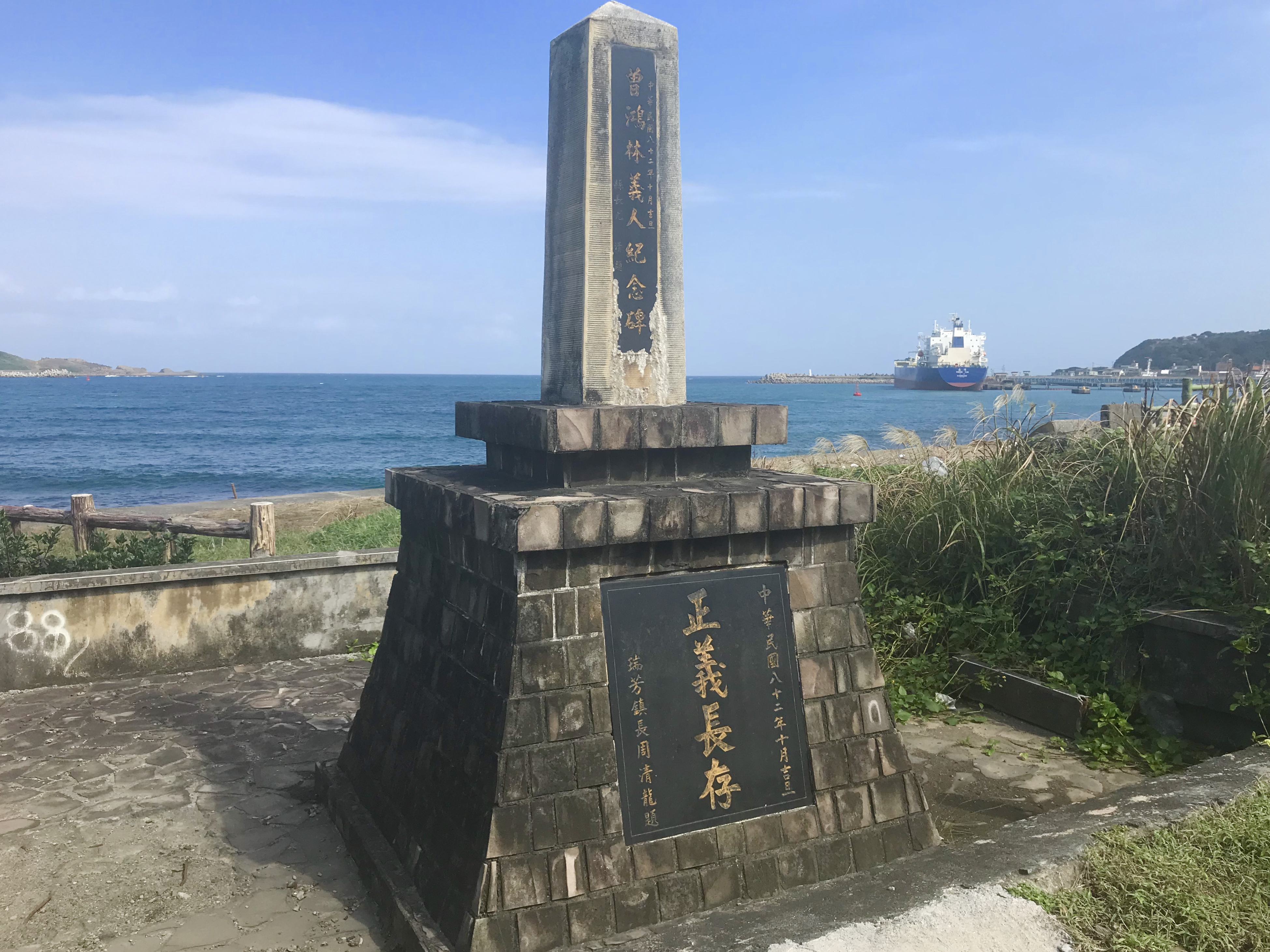 曾鴻林義人紀念碑與背後的象鼻岩與蝙蝠洞公園